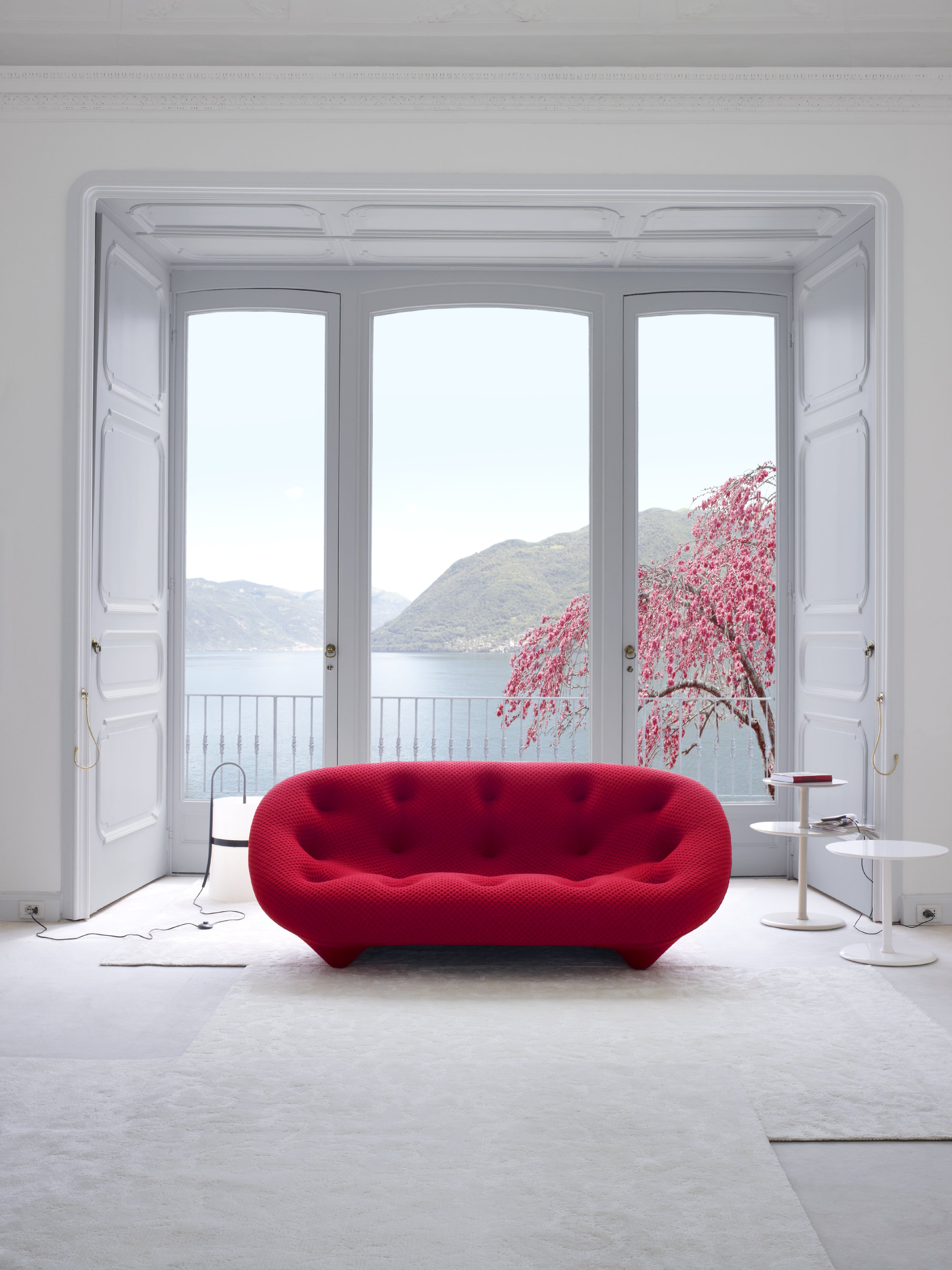 3-Sitzer